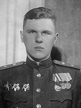 Советский военный деятель Владимир Кириллович Мерецков в 1945 году.